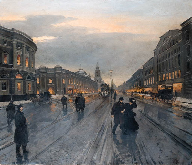 Беггров Александр Карлович (1841-1914)